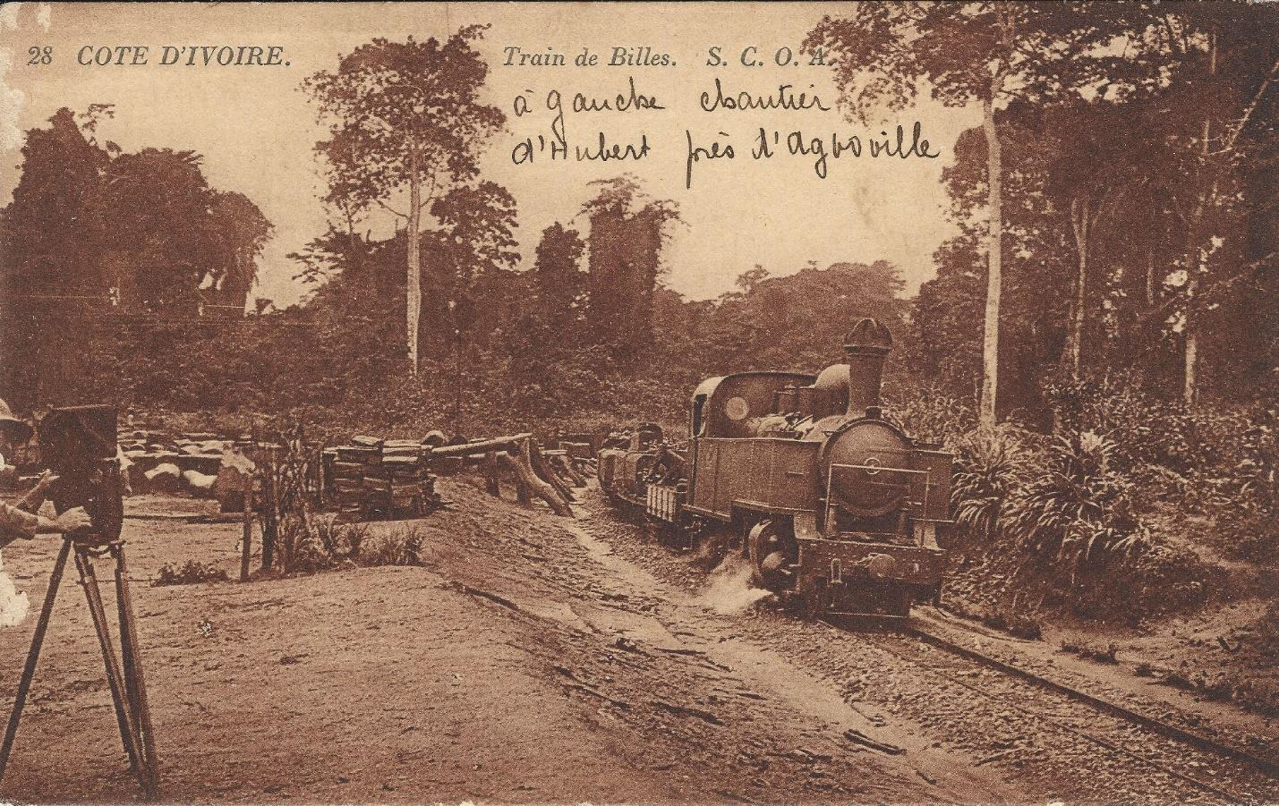 Cote d'Ivoire - Tren de Billes - S.C.O.A. - a gauche chantier d'Hubert pres d'Agroville